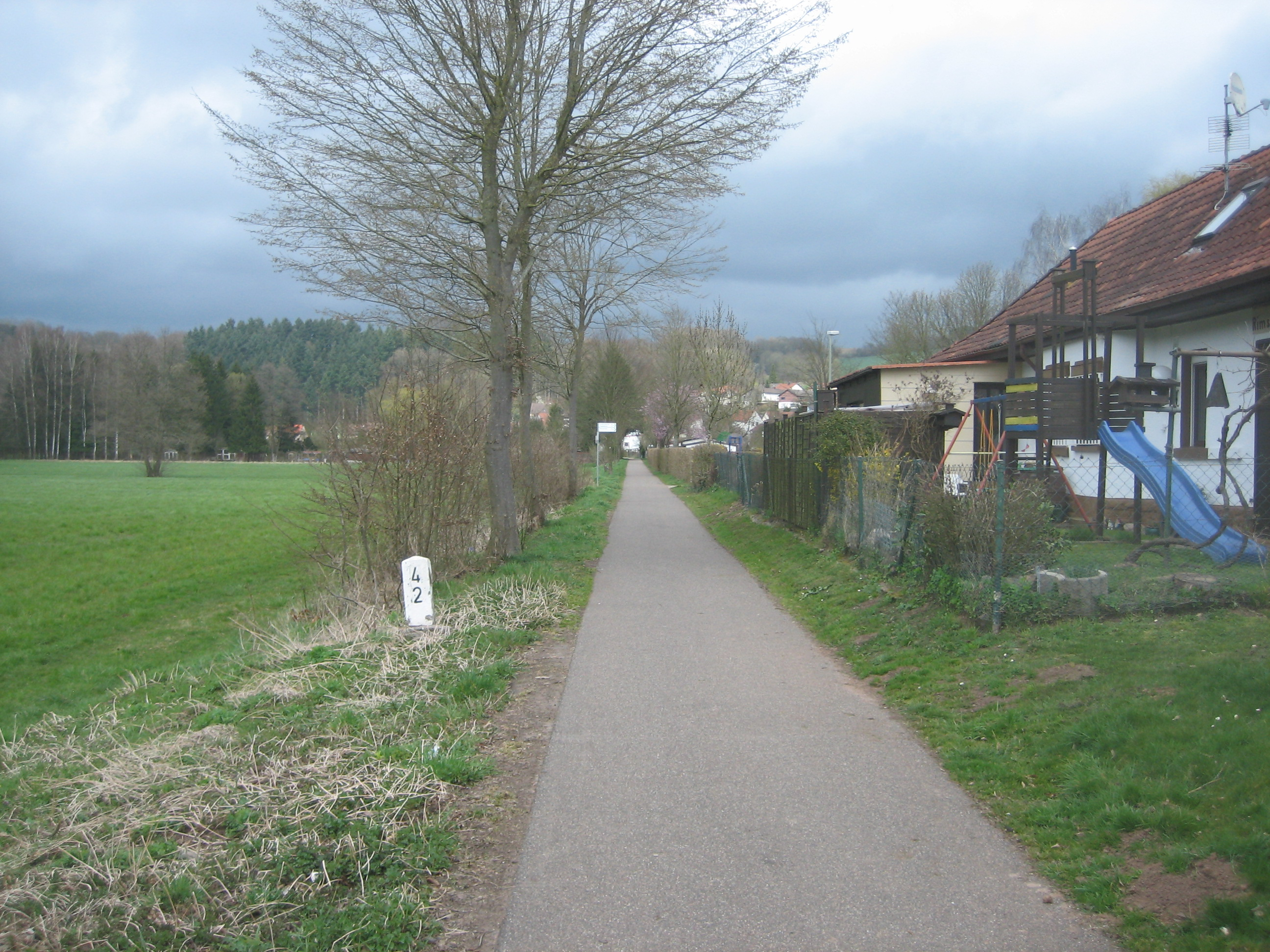 Bahntrasse und Kilometerstein auf Höhe des früheren Bahnhof Rimschweiler